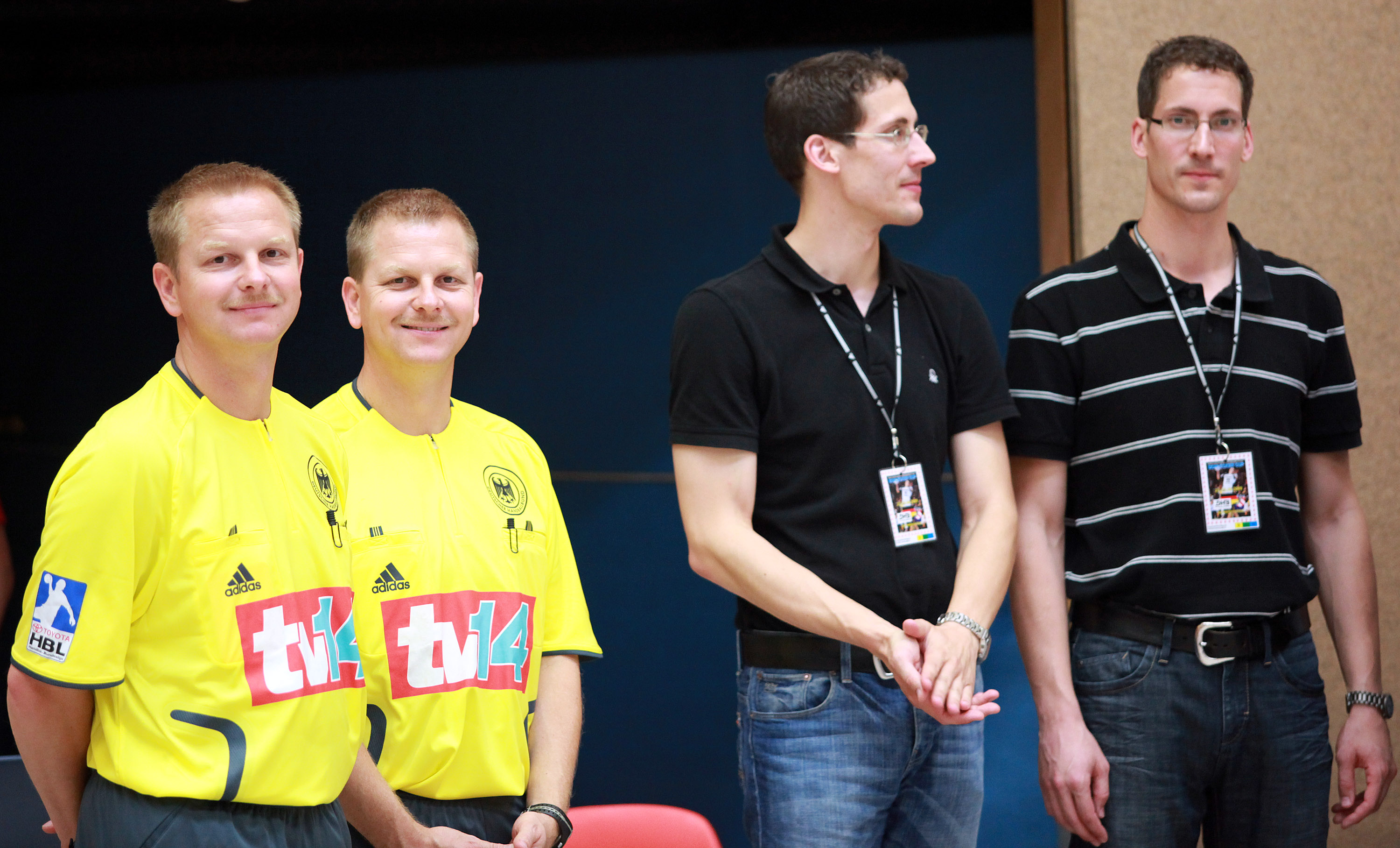 Bernd und Reiner Methe (links) und Andreas und Marcus Pritschow (rechts), jeweils eineiige Zwillinge und alle vier Handballschiedsrichter.